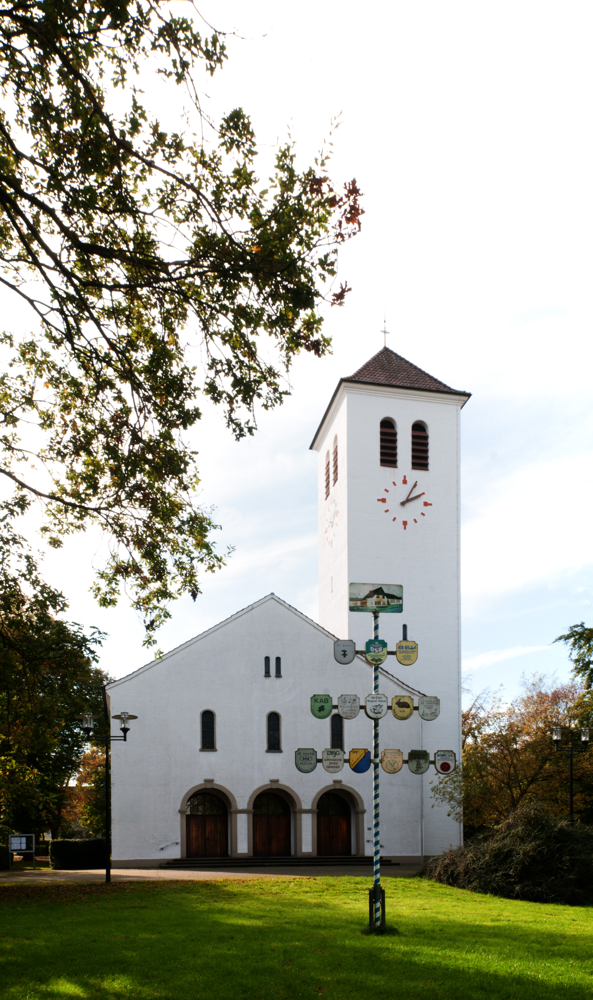 kath. Kirche St.-Joseph in Neheim-Bergheim